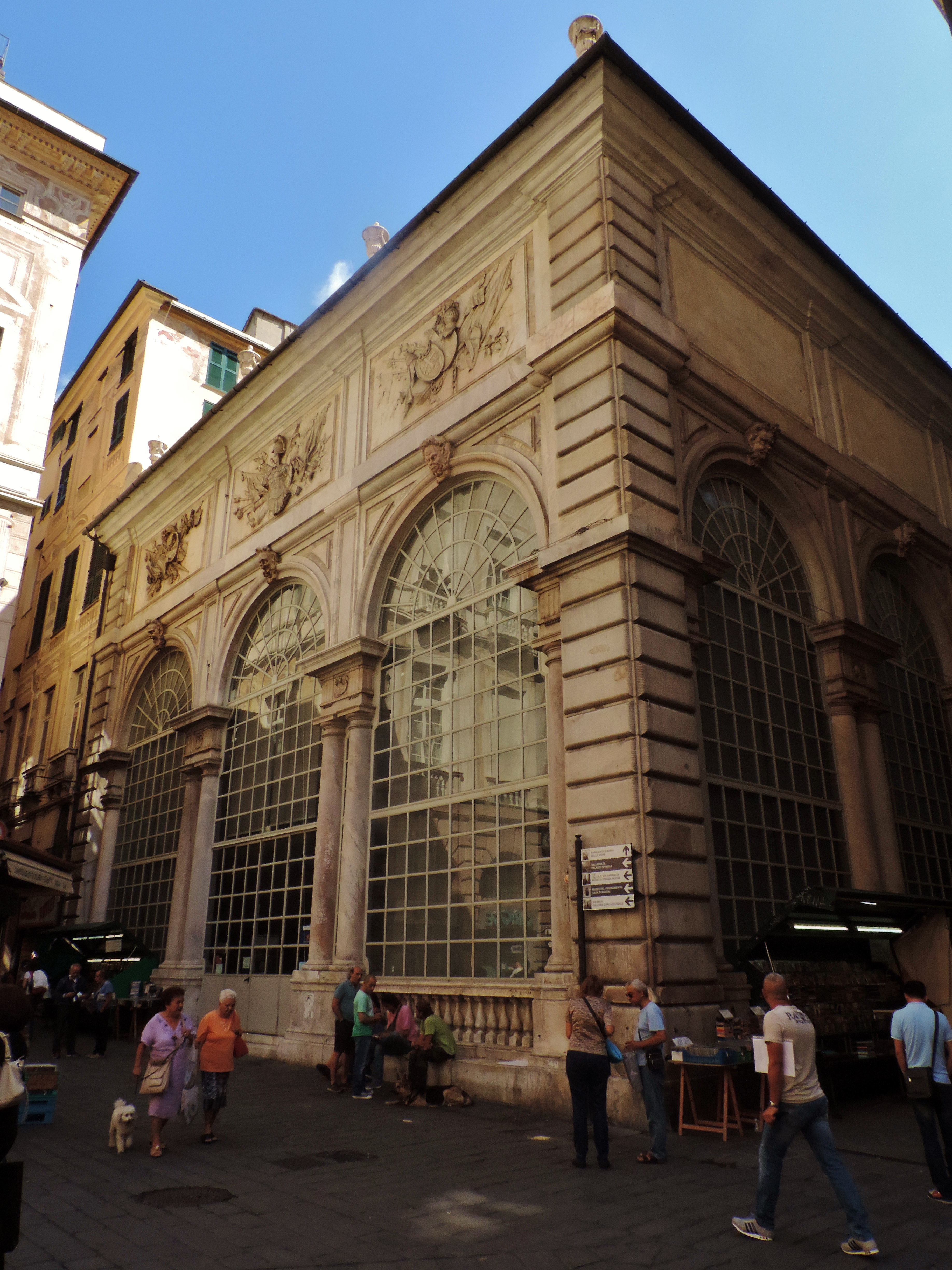 Loggia dei Mercanti This is a photo of a monument which is part of cultural heritage of Italy.